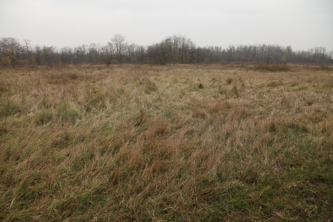 Parco Groane 11/2010